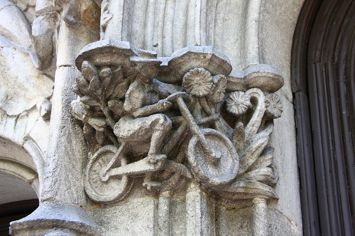 Figura d'un ciclista a l'entrada de la Casa Macaya (Barcelona-Catalunya). Obra d'Eusebi Arnau, és un momenatge a Josep Puig i Cadafalch, l'arquitecte d'aquest palau, qui feia servir aquest mitjà de locomoció per anar a visitar les seves obres per Barcelona.